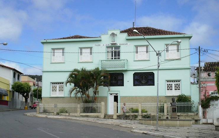 Residência episcopal (bishop residence), Caetité, Bahia, Brazil